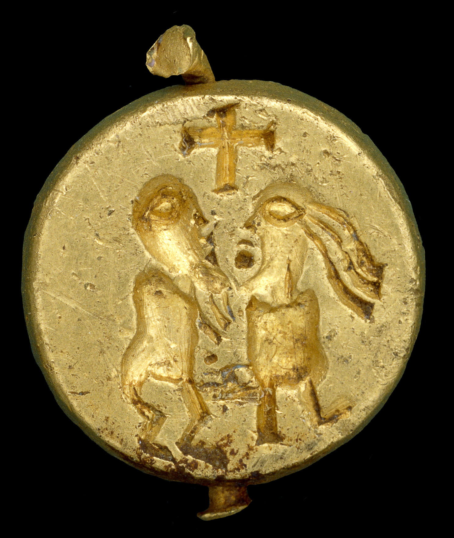 PAS-8709C3